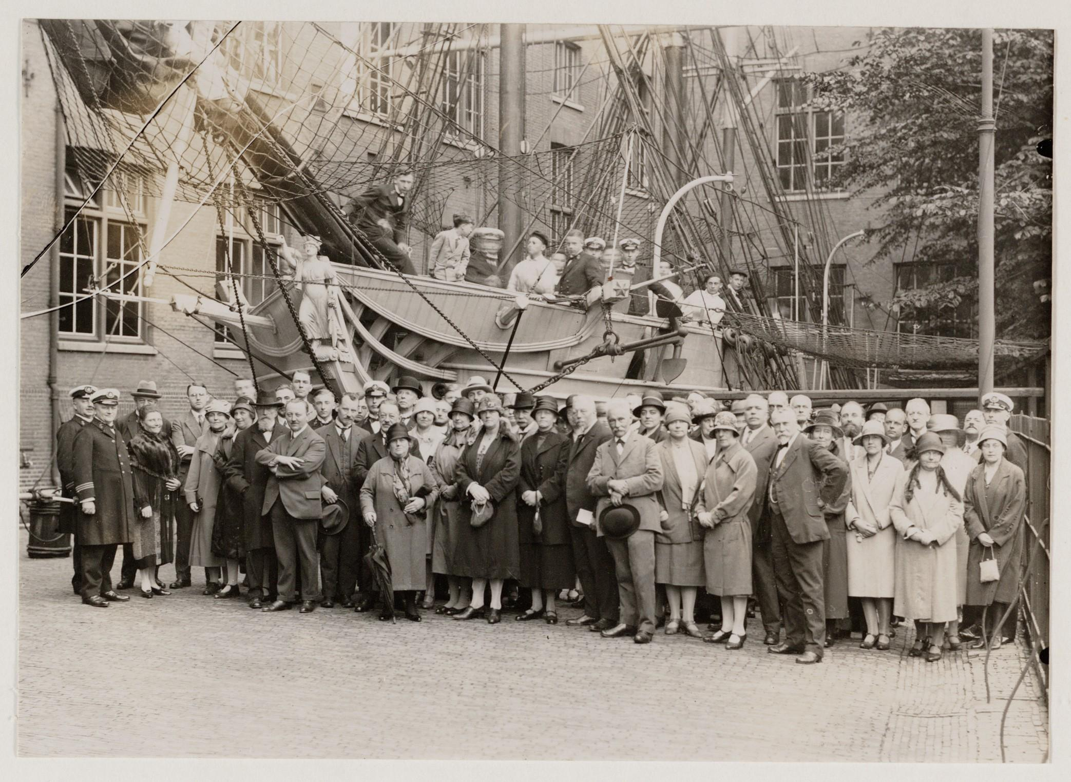 Beschrijving Groepsfoto met vooraanstaande personen vóór een instructieschip op de binnenplaats van de Kweekschool voor de Zeevaart Prins Hendrikkade 189. Documenttype foto Vervaardiger Onbekend Anoniem Collectie Collectie Stadsarchief Amsterdam: foto-afdrukken Datering 1910 ca. Geografische naam Prins Hendrikkade Inventarissen Afbeeldingsbestand OSIM00003001574